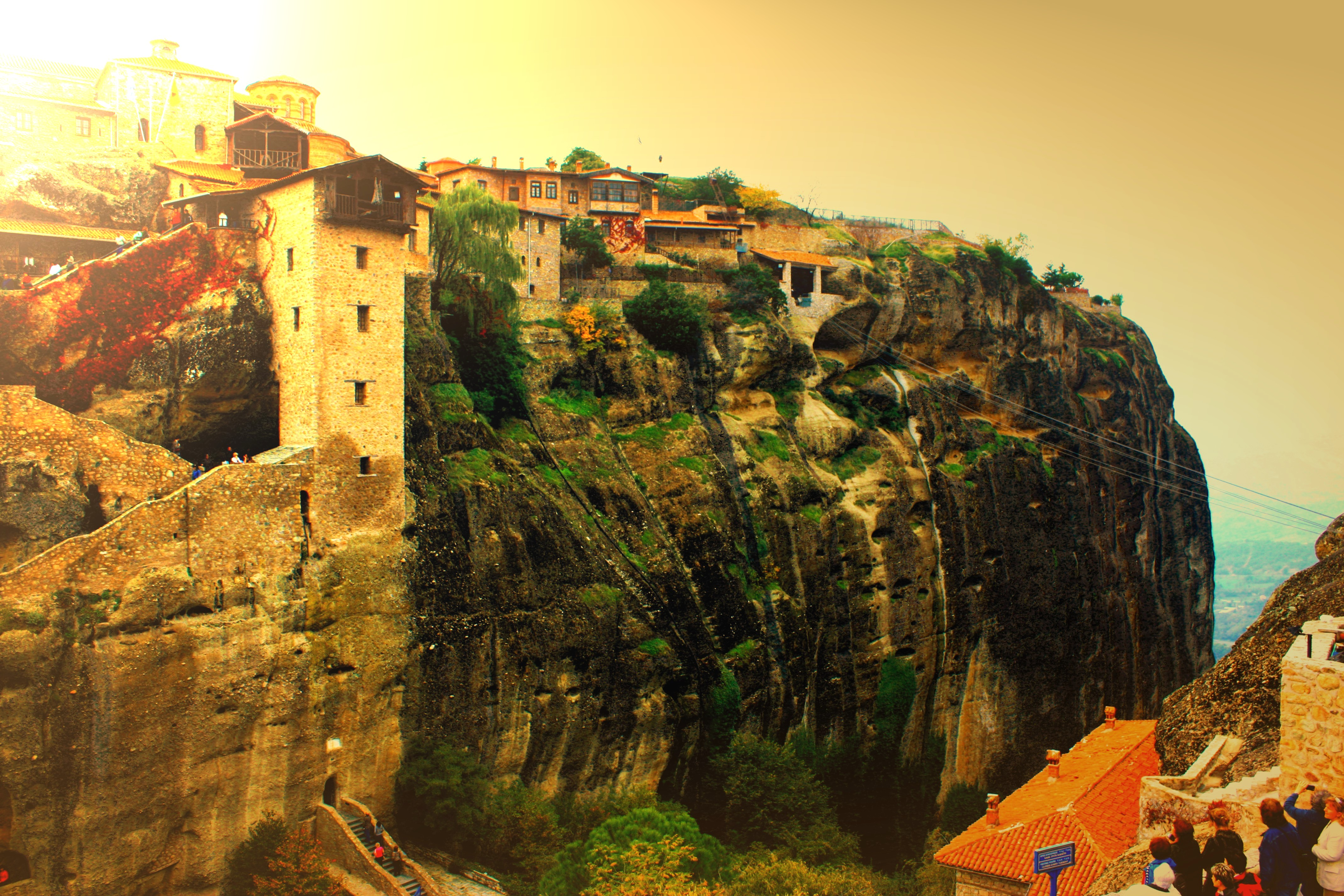 Nagy Meteóra kolostor